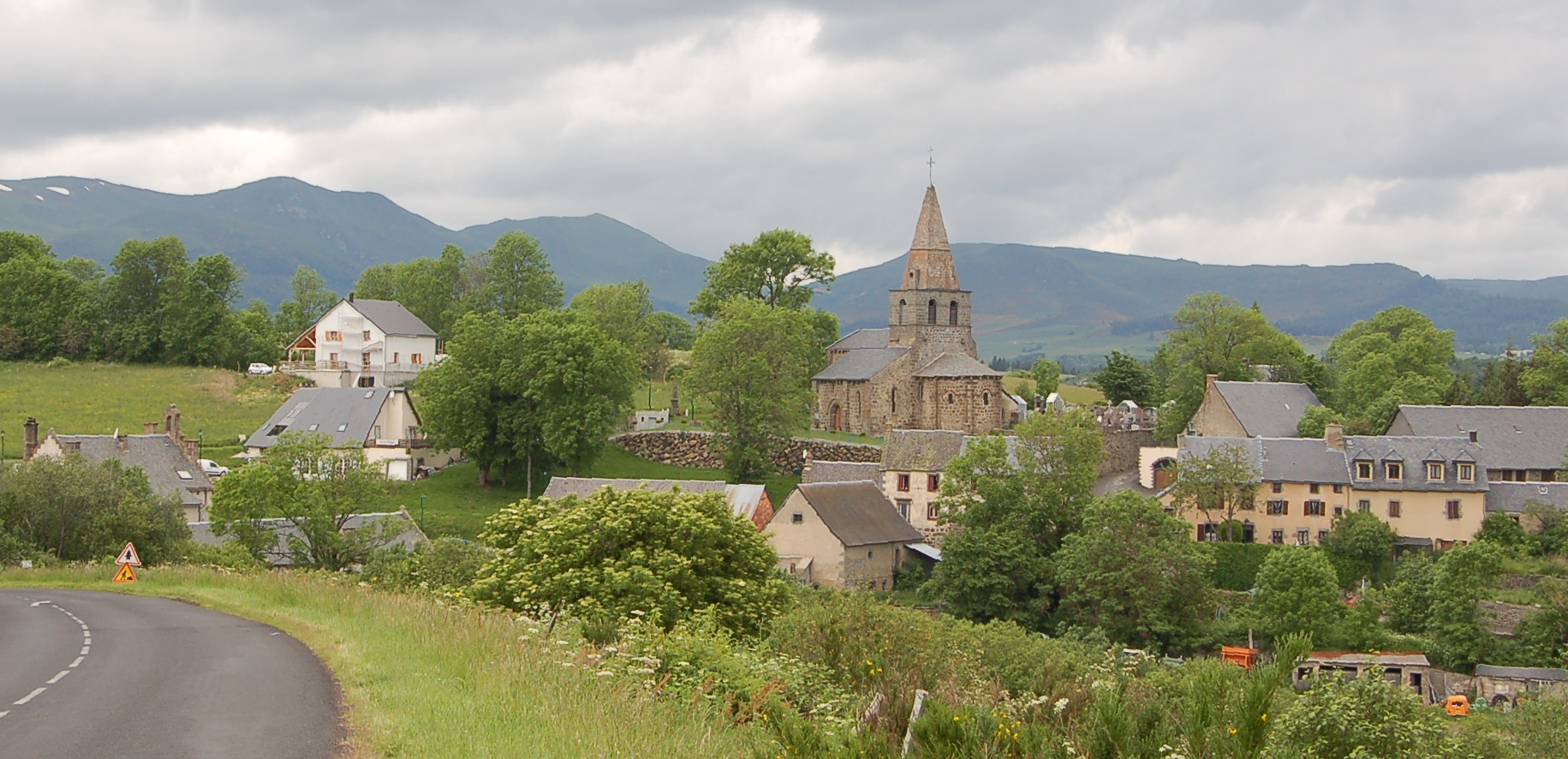 St Victor-la-Rivière